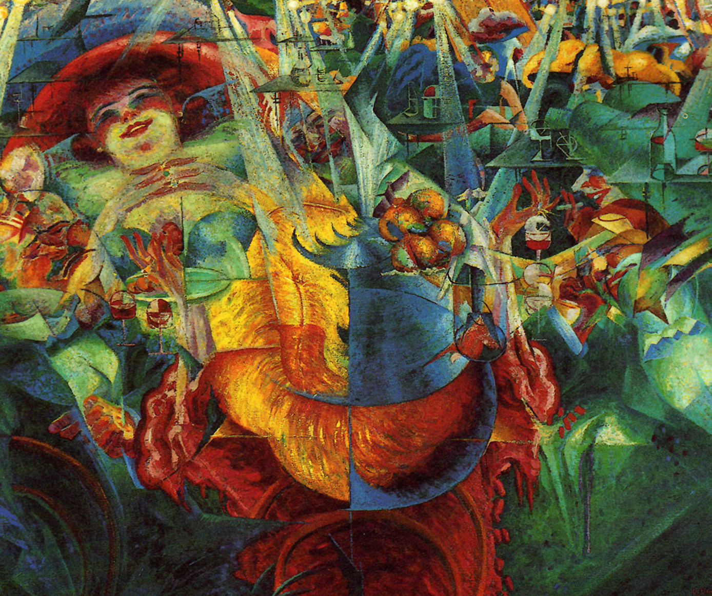 futurist painting